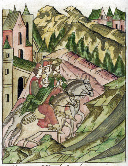 ЛИЦЕВОЙ ЛЕТОПИСНЫЙ СВОД В ту зиму были большие морозы со снегом после оттепели. В ту же весну князь Михаил Александрович пошел в Орду.